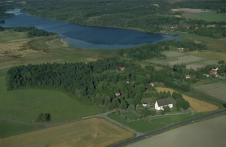 Funbo kyrka i bildens nedre del.